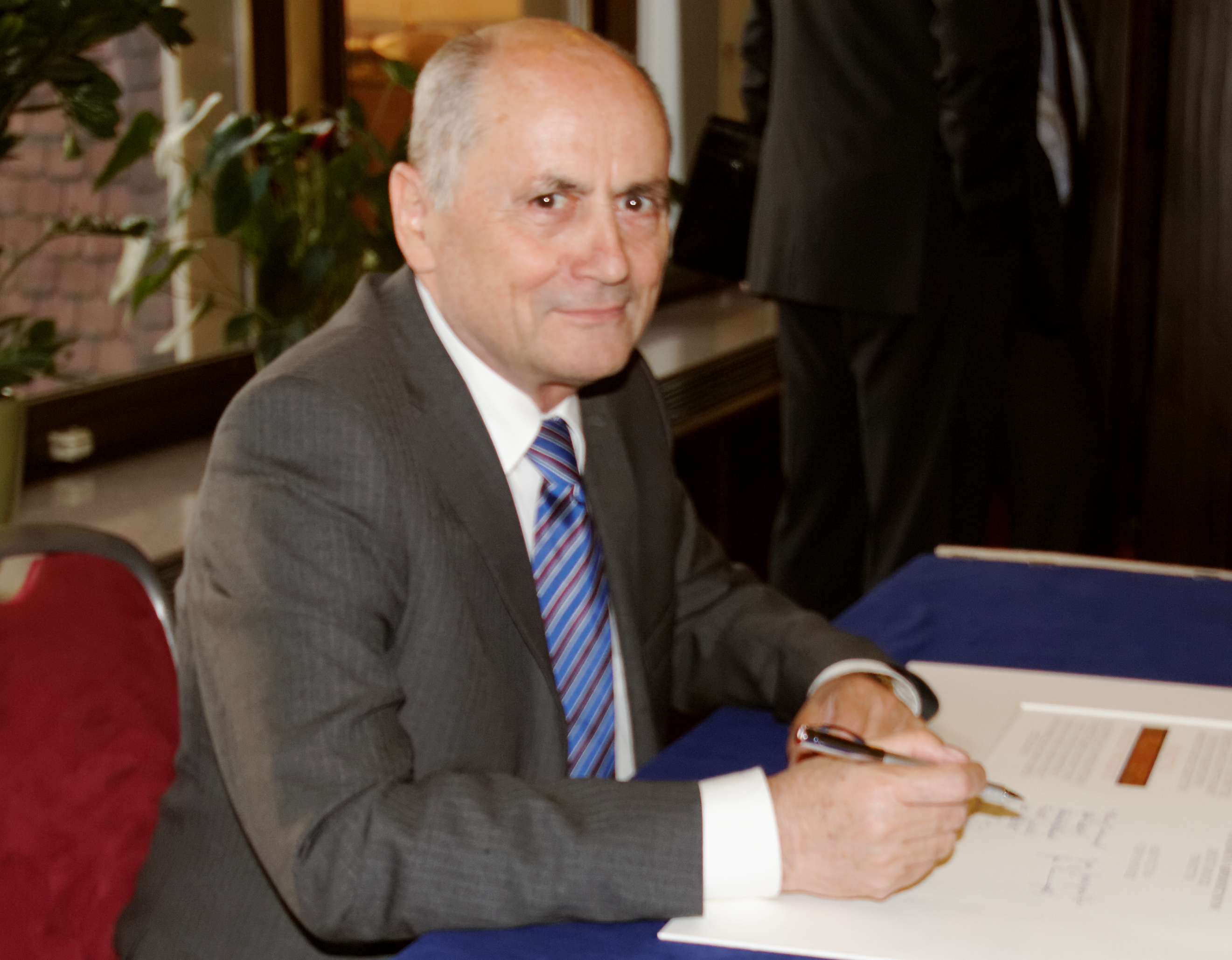 Ján Carnogurský, Unterzeichnung der Adalbert-Preis Urkunde 2013